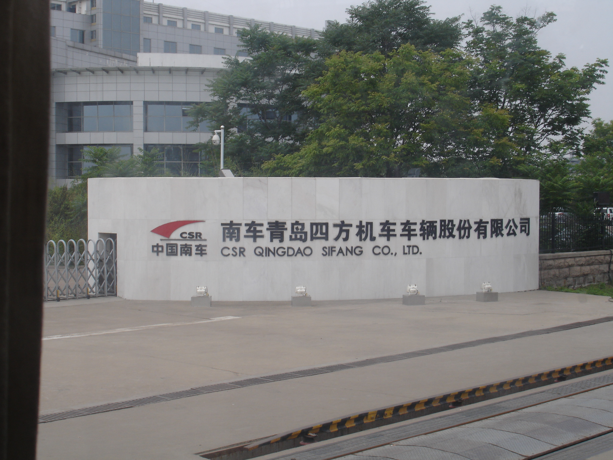 南车青岛四方机车车辆股份有限公司棘洪滩厂区大门